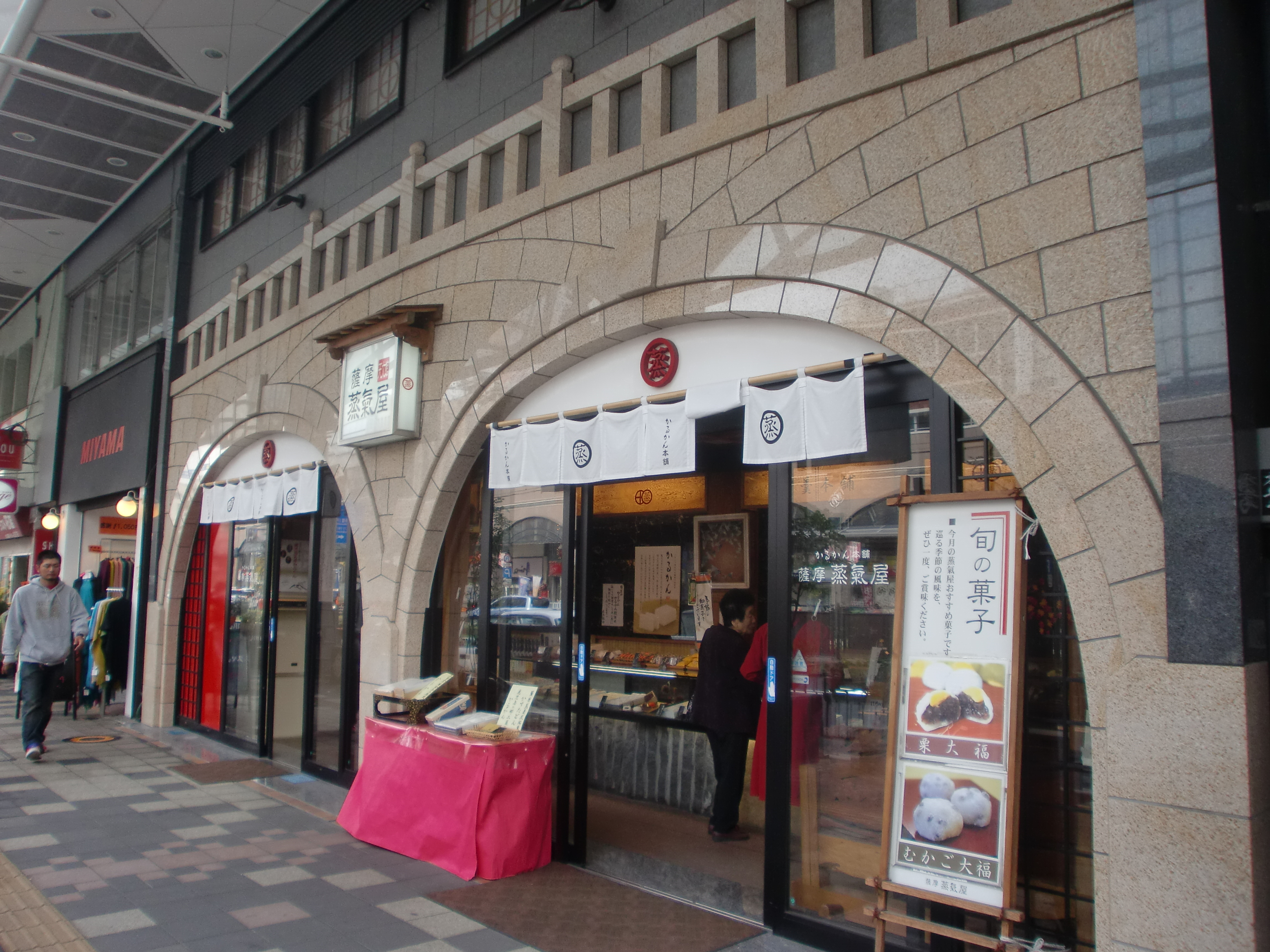 薩摩蒸気屋天文館店の外観。